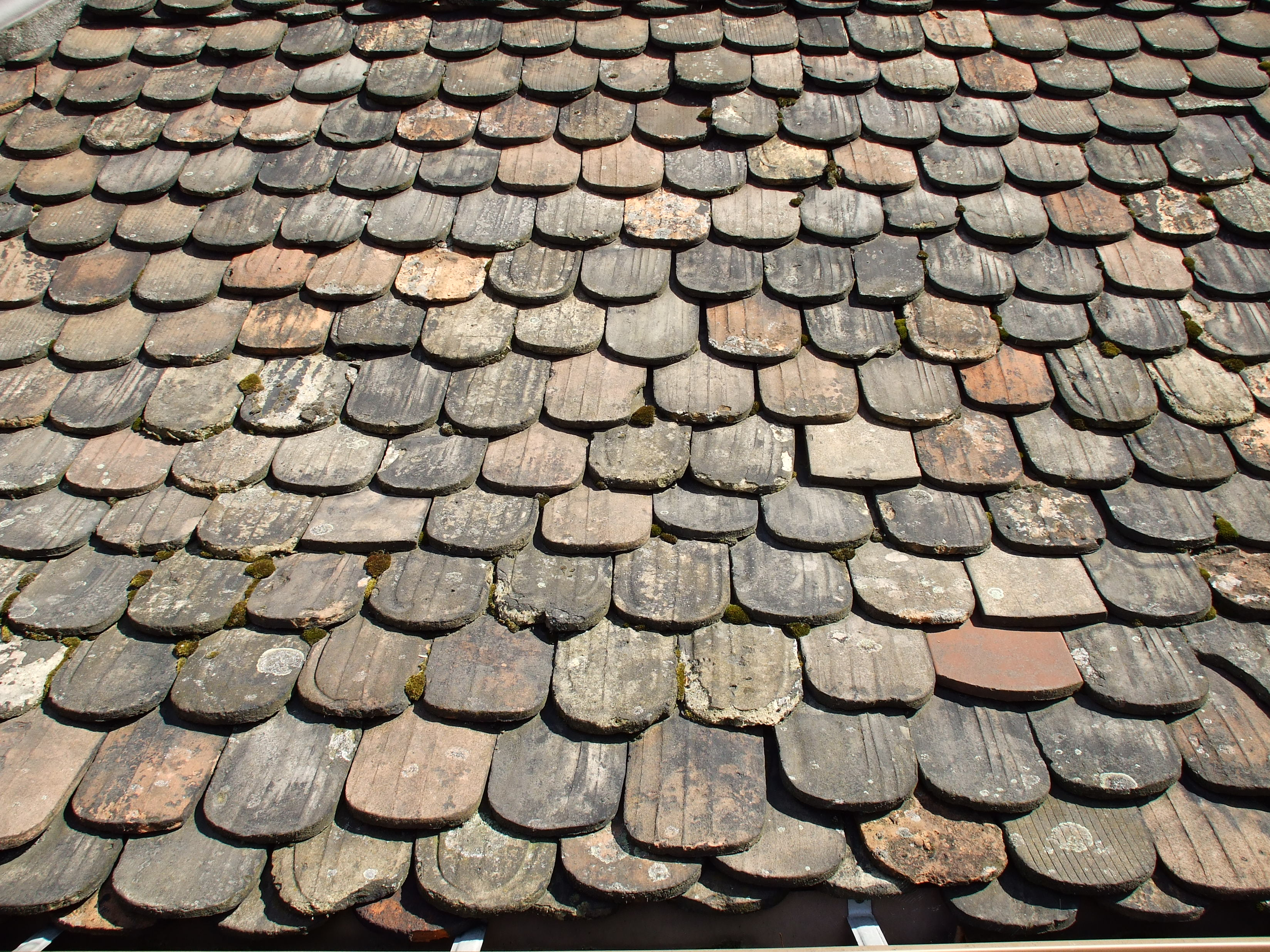 Strasbourg Petite France détail d’une toiture en tuiles Biberschwanz